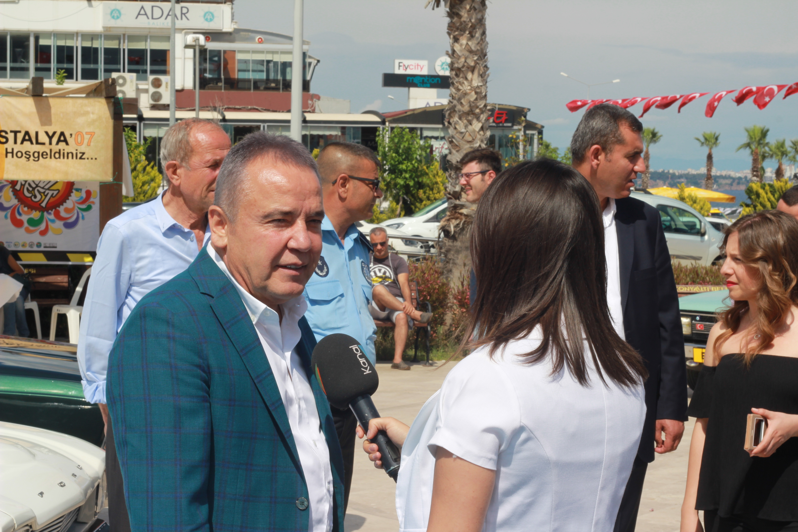 Muhittin Böcek, 1999-2019 arasında Antalya Konyaaltı Belediye Başkanı, Hobifest etkinliği sırasında Kanal V'ye röportaj verirken.